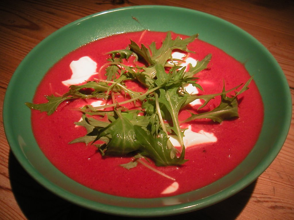 Rødbedesuppe